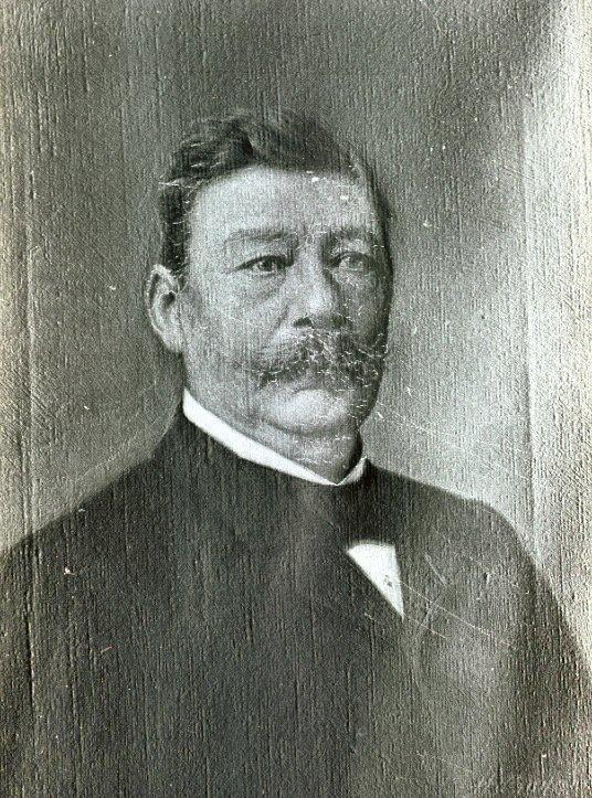 Lodewijk Bernardus Johannes Dommers